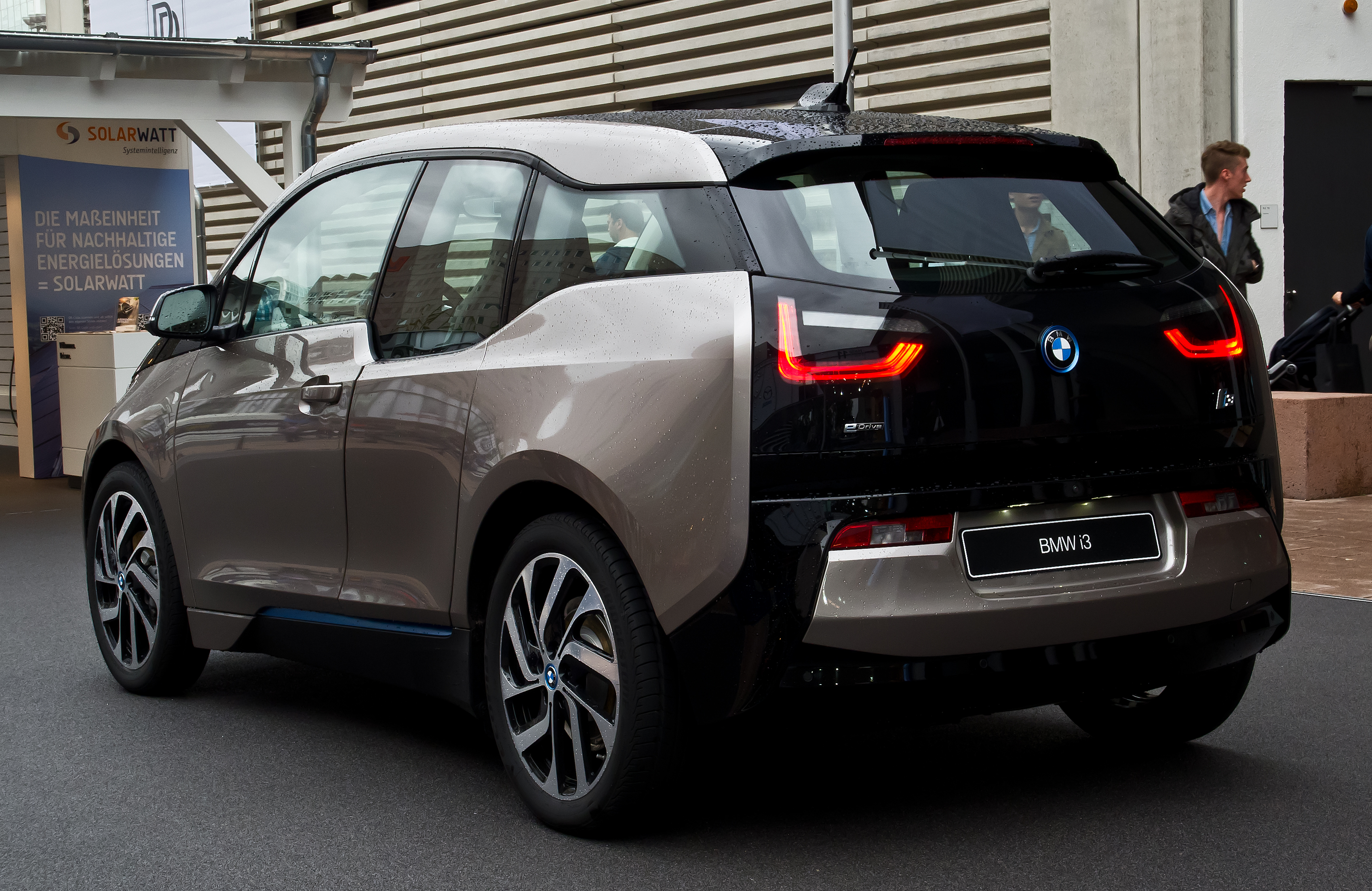 BMW i3